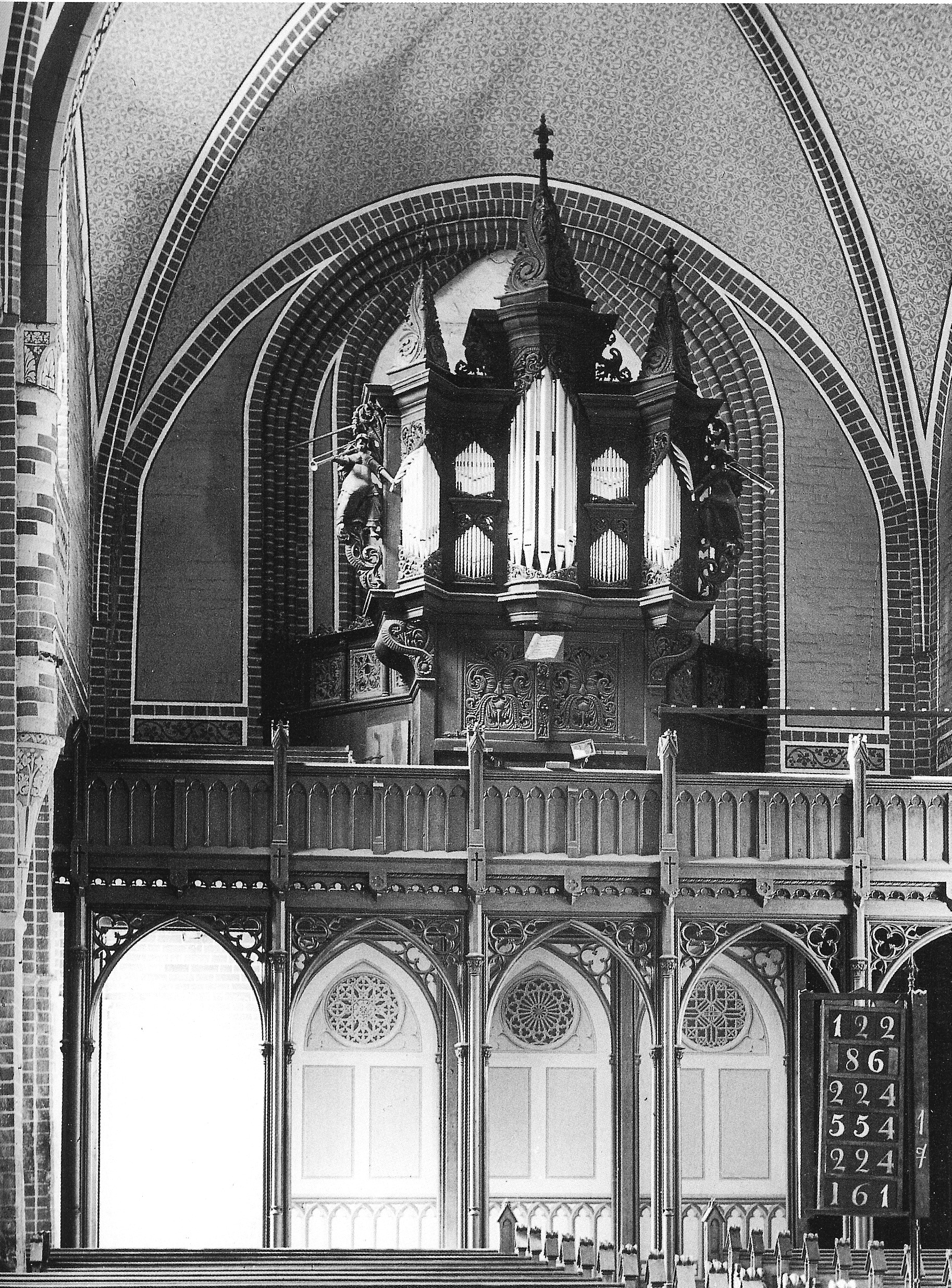 Klosterkirche/Schlosskirche Dargun, Blick zur Orgel (verbrannt 1945) Arp Schnitger (1700) / Friedrich Friese II (1850/51), Carl Börger (1911) Foto von Karl Eschenburg 1934